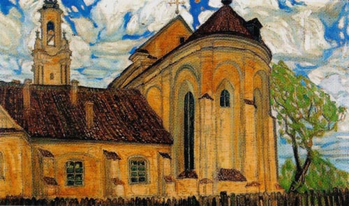 Карціна Зыгмунта Буйноўскага